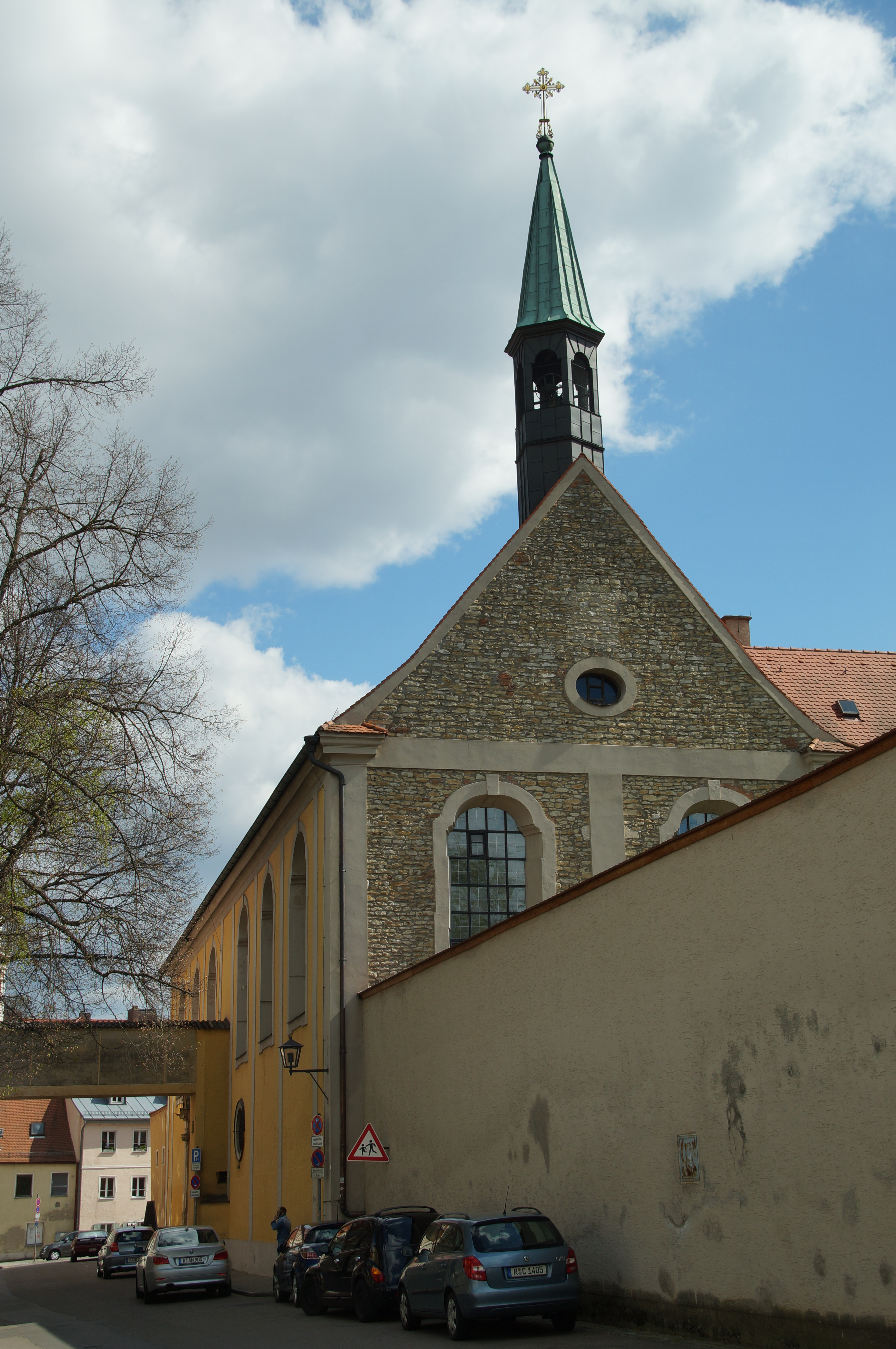 Klosterkirche und Klostergebäude Hl. Kreuz, Dominikanerinnenkloster, gegründet 1233; Klosterkirche Hl. Kreuz, gestelzte Saalkirche mit eingezogenem Chor und Dachreiter, westlich anschließend Kapitelsaal, Gründungsbau 1237-44, 1751-57 vollständig überformt; mit Ausstattung; Klostergebäude, zweigeschossiger Baukomplex, Nordflügel: vierflügeliger Kreuzgang an der Südseite der Kirche, Westflügel: zweigeschossiger, zum Stahlzwingerweg giebelständiger Satteldachbau, mit Vorrefent und Refektorium, Südflügel mit Wirtschaftsbau, Konventbau und Sixtuskapelle, Ostflügel mit Speisgewölbe, Ossuarium und St.-Kilianskapelle, hauptsächlich 13.-17. Jahrhundert, Brand 1547, nach teilweiser Kriegszerstörung 1945 Wiederaufbau bis 1946; Ökonomiehof mit Sprechzimmerflügel und Klausurpforte, zweigeschossiger Halbwalmdachbau mit Erdgeschossarkaden, 1628; Ehemaliges Pförtnerhaus und Getreidekasten, dreigeschossiger Satteldachbau, 17. Jahrhundert; Altes Schulhaus, dreigeschossiger giebelständiger Steildachbau, 17./18. Jahrhundert, Überformung im 19. und 20. Jahrhundert; Küchenflügel, zweigeschossiger und traufständiger Satteldachbau mit Kniestock, 17. Jahrhundert, Wiederaufbau 1946; Klostermauer, Torbau mit rundbogiger und gewölbter Durchfahrt zur Kreuzgasse, und dreiseitige Ummauerung des Klostergartens, Bruchsteinmauer, bez. 1617 und 1719